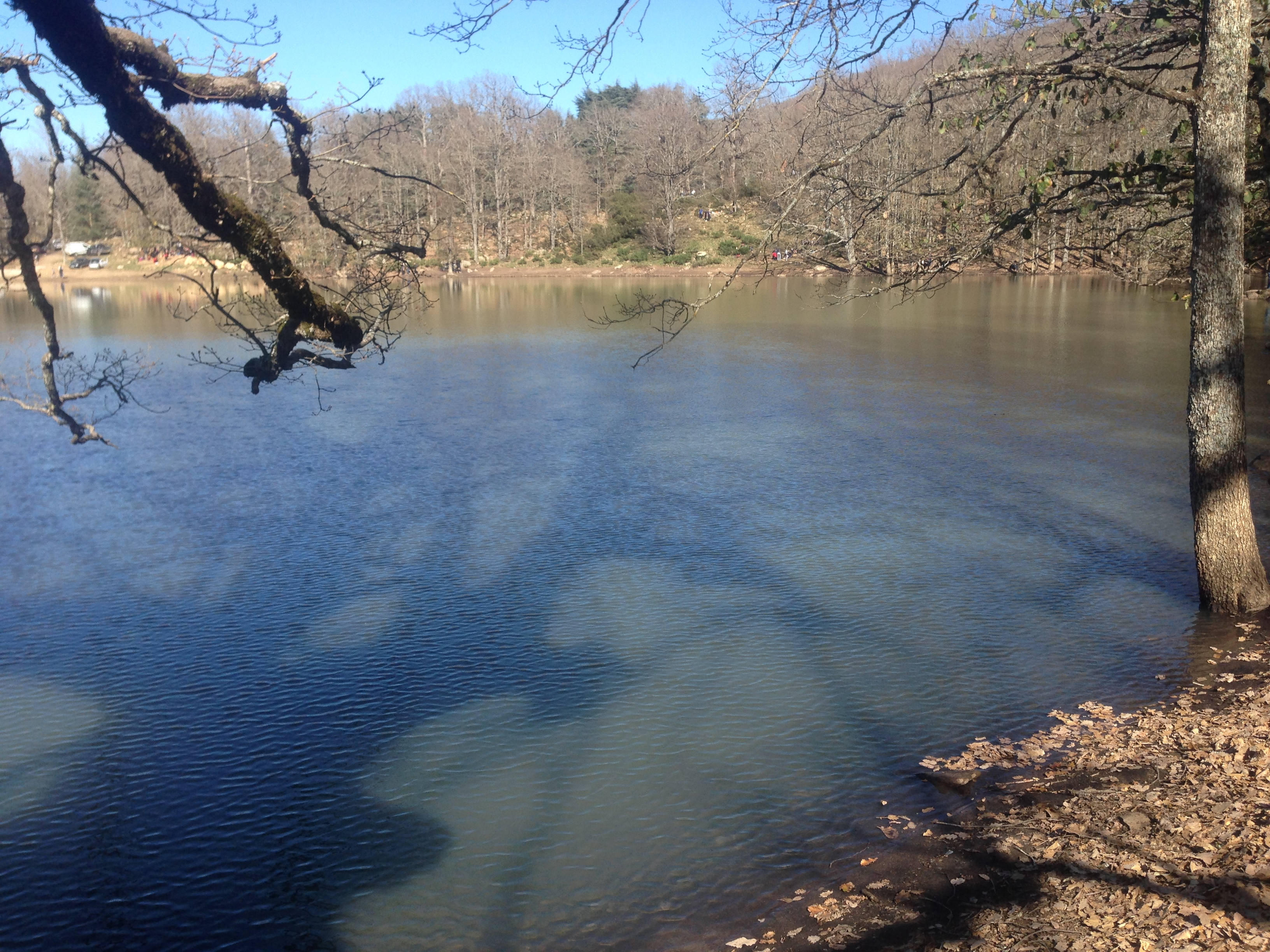 lac noir a Bejaia en Algérie